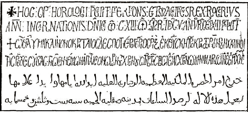 Inscription trilingue pour une horloge hydraulique du Roi Roger II de Sicile à Palerme, plaque commémorative subsistante ; traduction : Thèse de Charles-Henri Eyraud, p. 69, lire en ligne